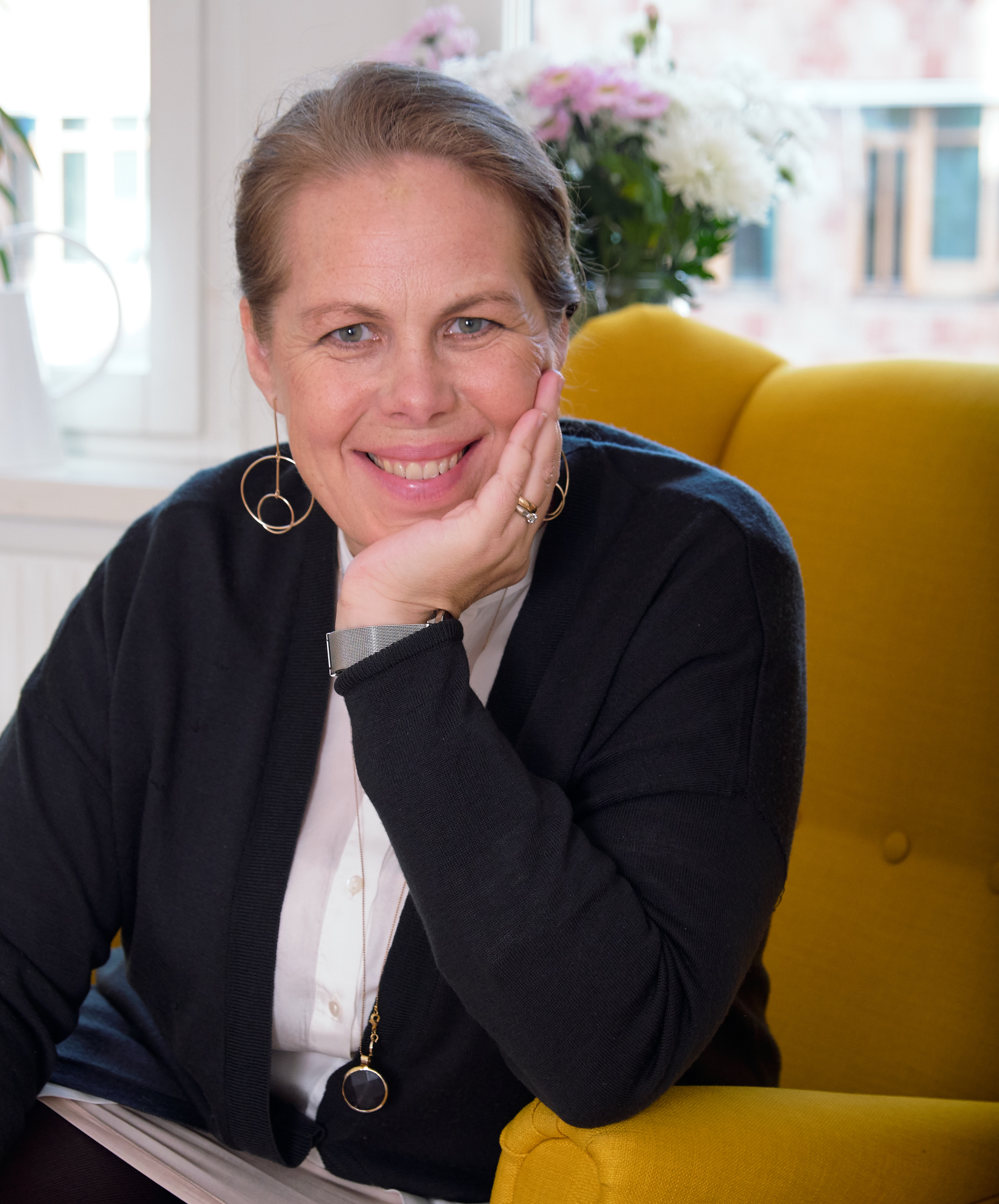 Petra Brylander, skådespelare, regissör och teaterchef